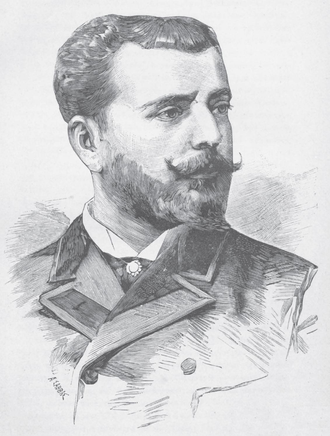 nahmhafte Griechische Persönlichkeit, 19. Jahrhundert